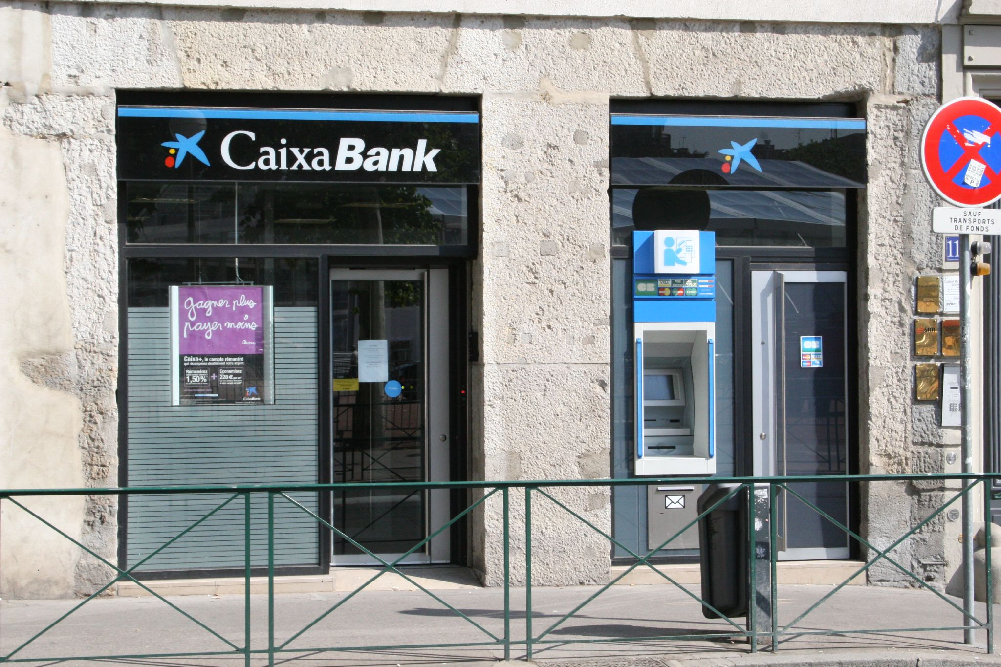 Oficina de CaixaBank France a Lió